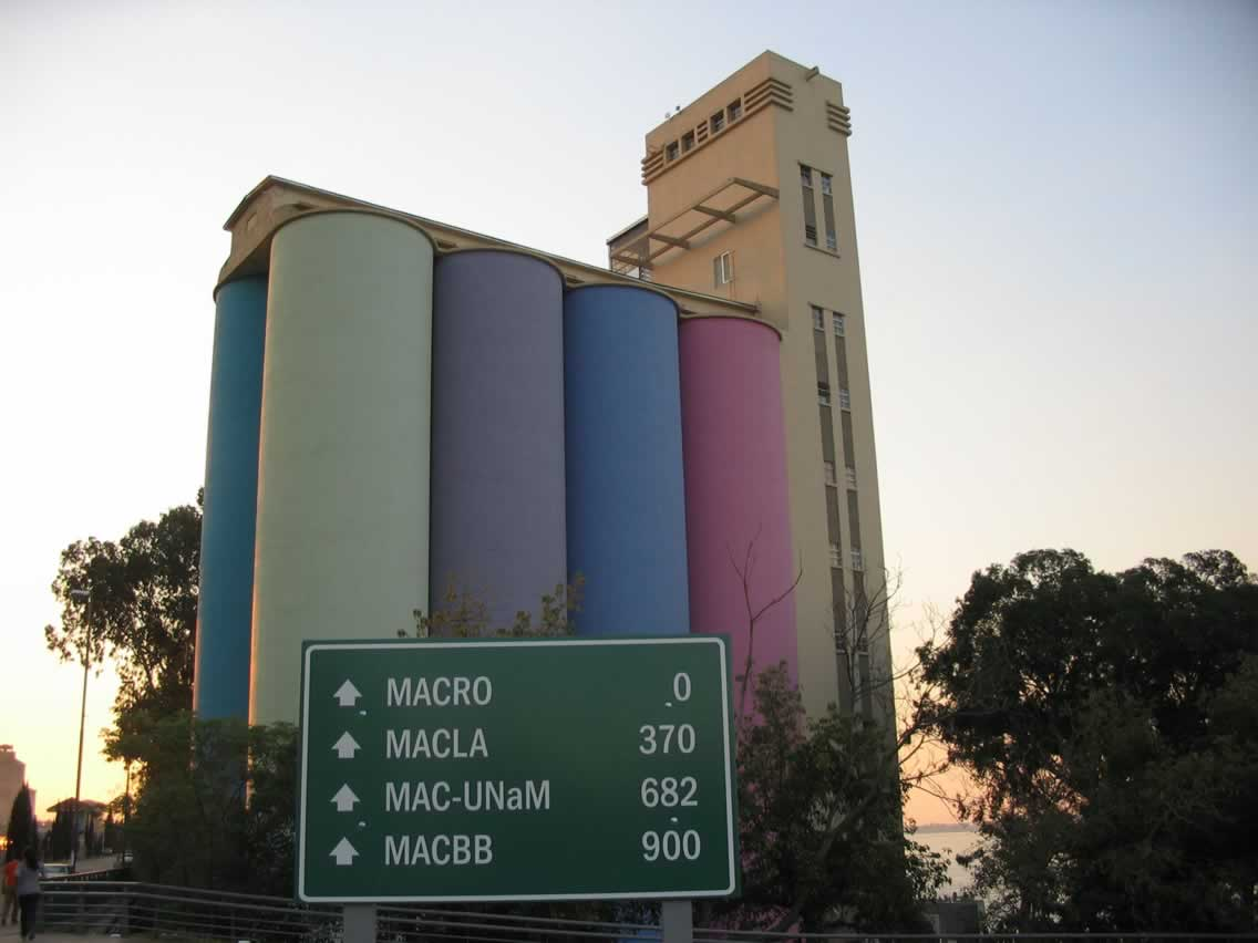 Obra de Cristian Segura para la 2SAR06